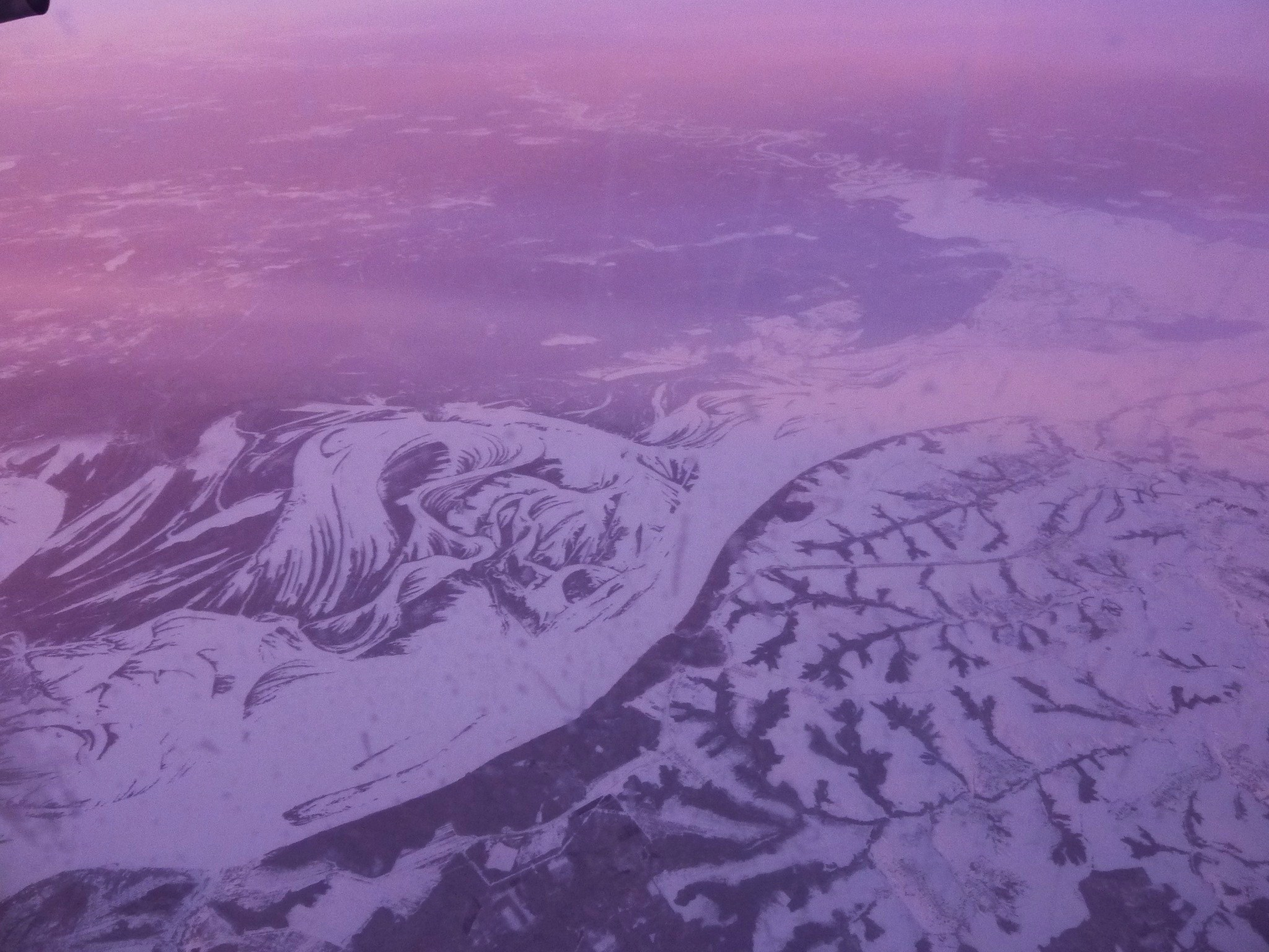 ·˙·ChinaUli2010·.· Republik Mari El